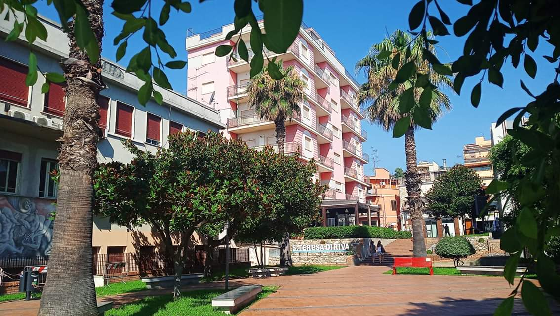 Piazza Municipio Santa Teresa di Riva